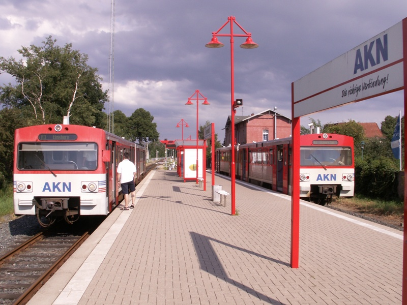 AKN Bahn 2007